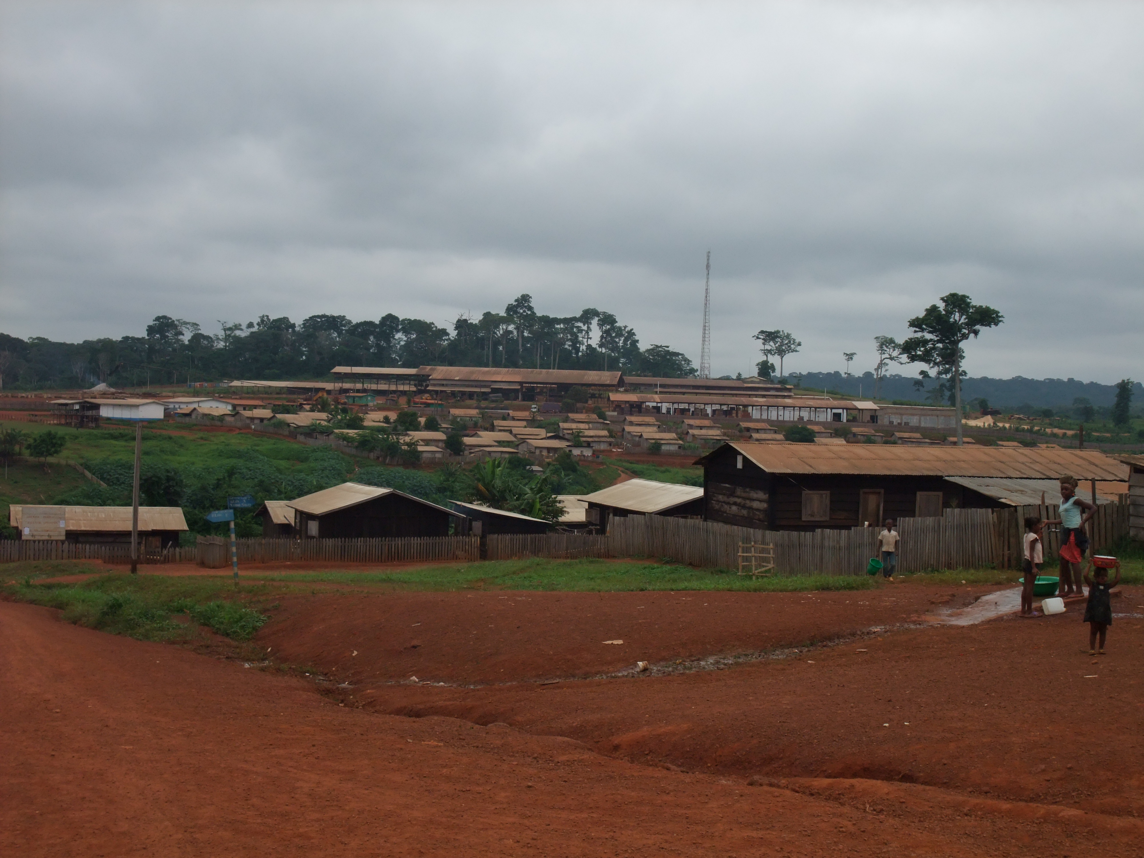 village du Cameroun, région de l'Est, au milieu de la forêt tropicale, "base-vie" de Lokomo avec une scierie de bois tropicaux